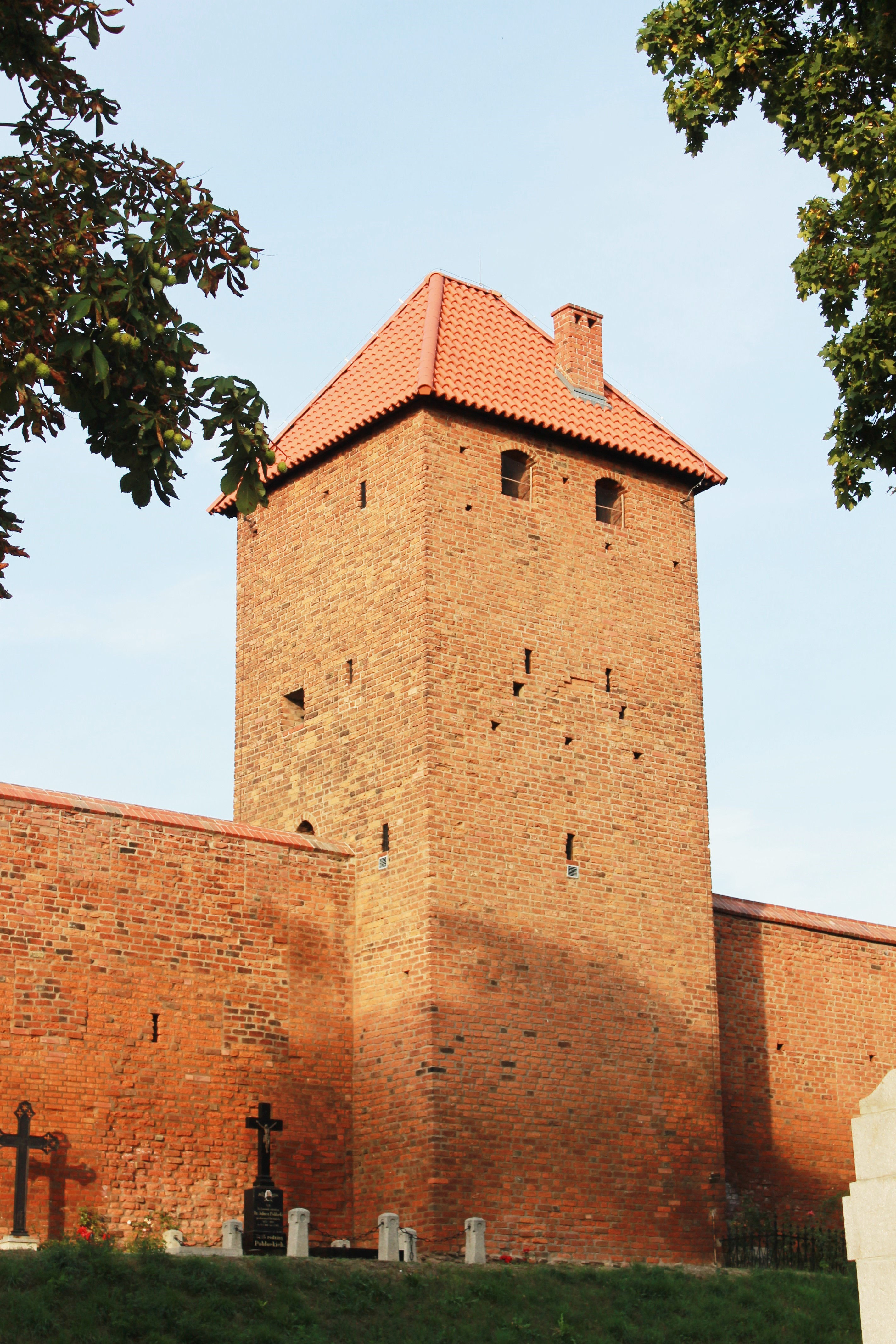 Chełmno, prochownia, XIII/XIV